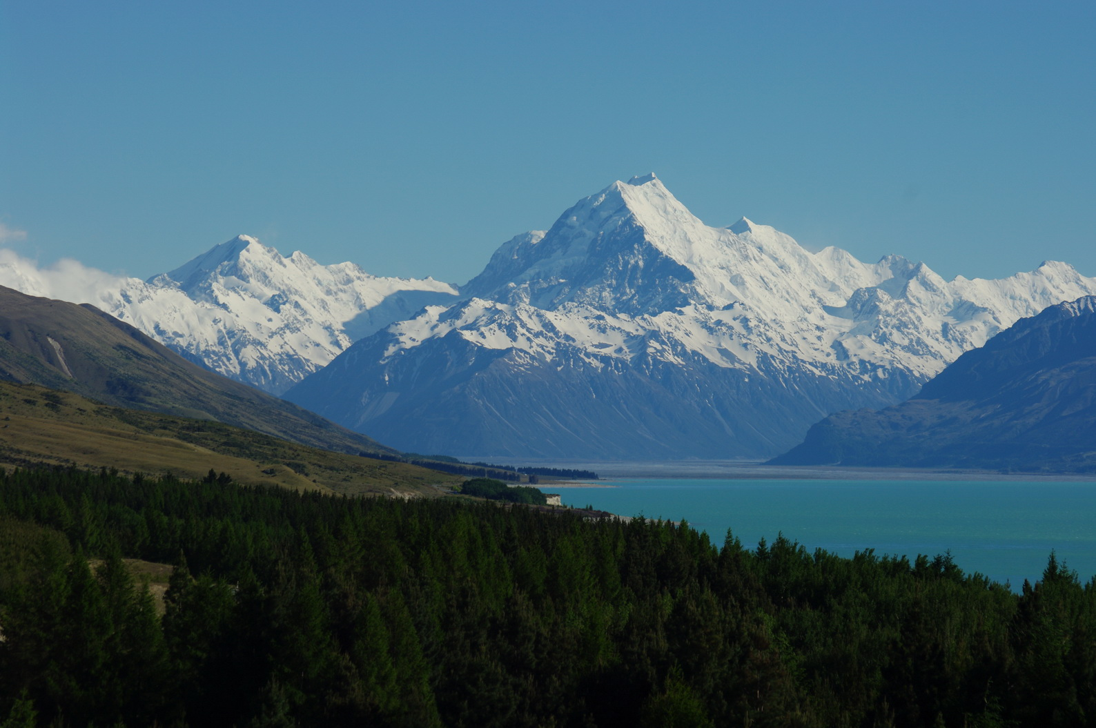 Mount Cook gesehen von Peters Lookout, Lake Tekapo, bei Twizel